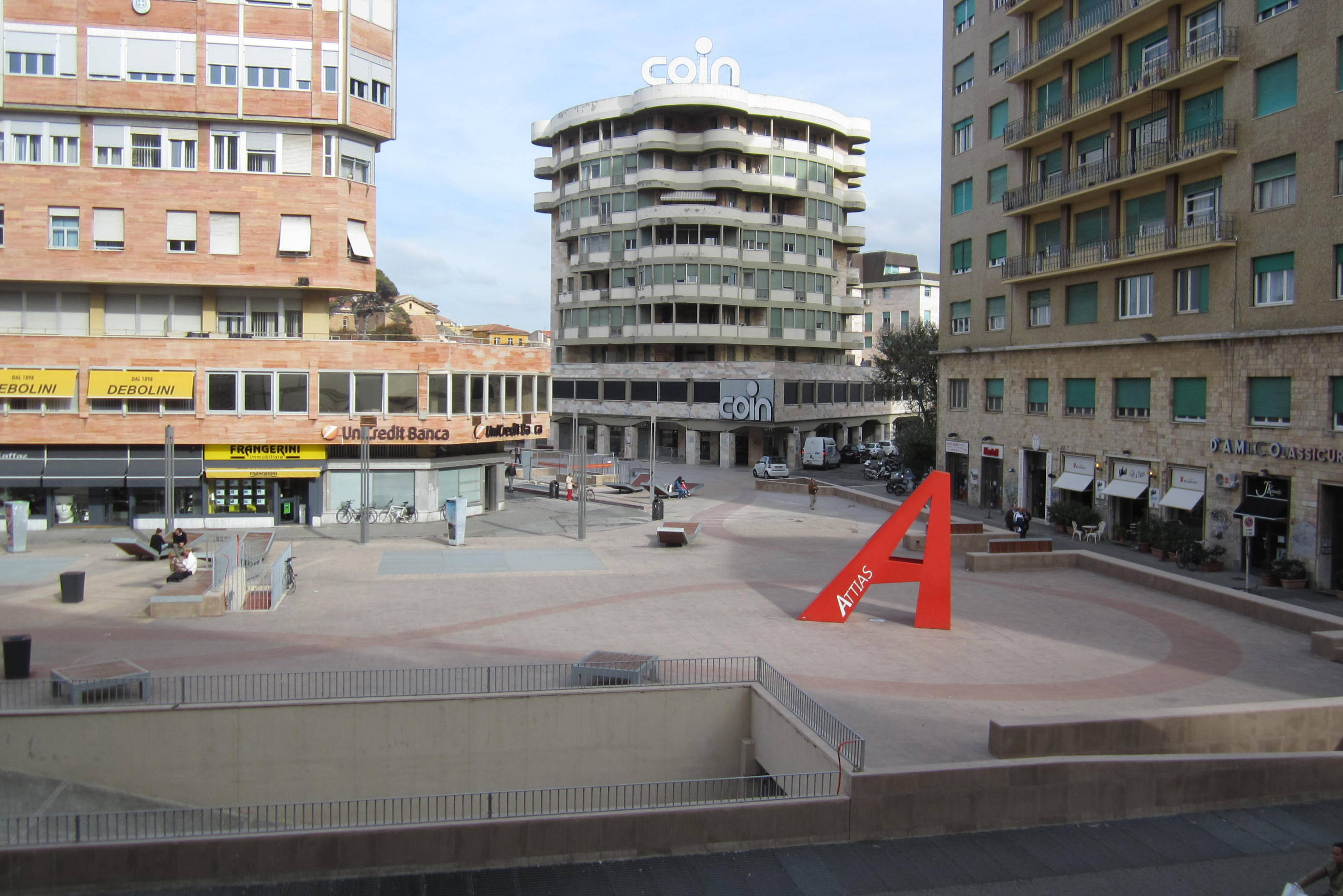 Piazza Attias nel centro di Livorno